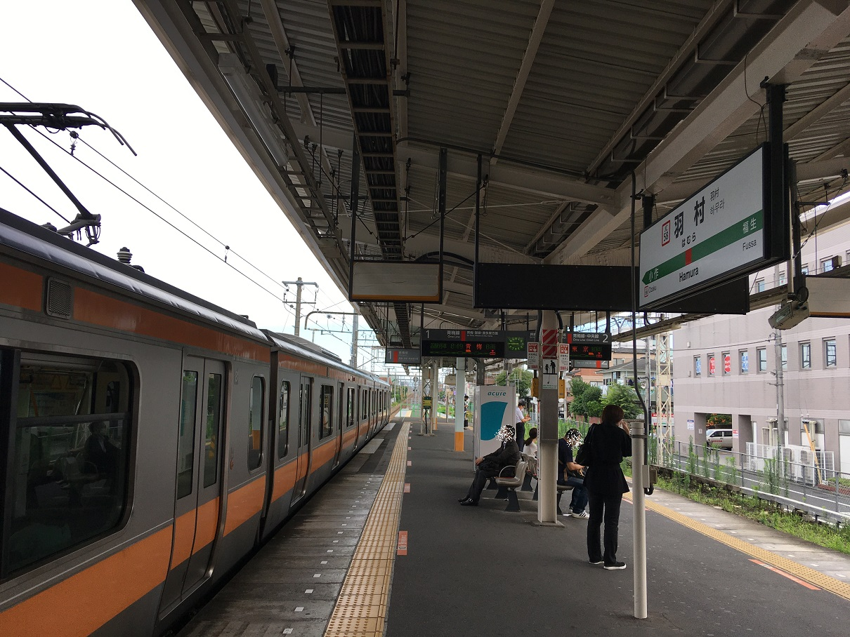 羽村駅プラットホーム